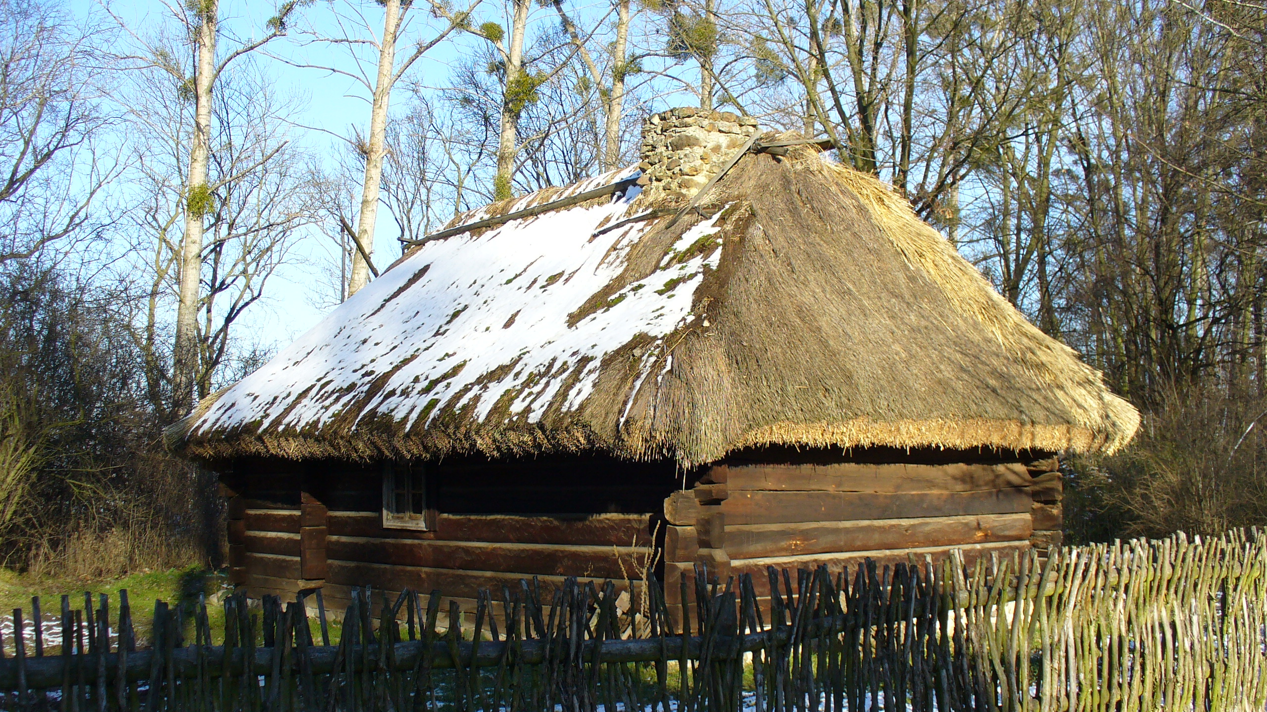 Muzeum Wsi Opolskiej - chałupa z Wichrowa, 1839 Bauernhuette aus Wichrau, 1839 The cottage from Wichrów (Wichrau), 1839